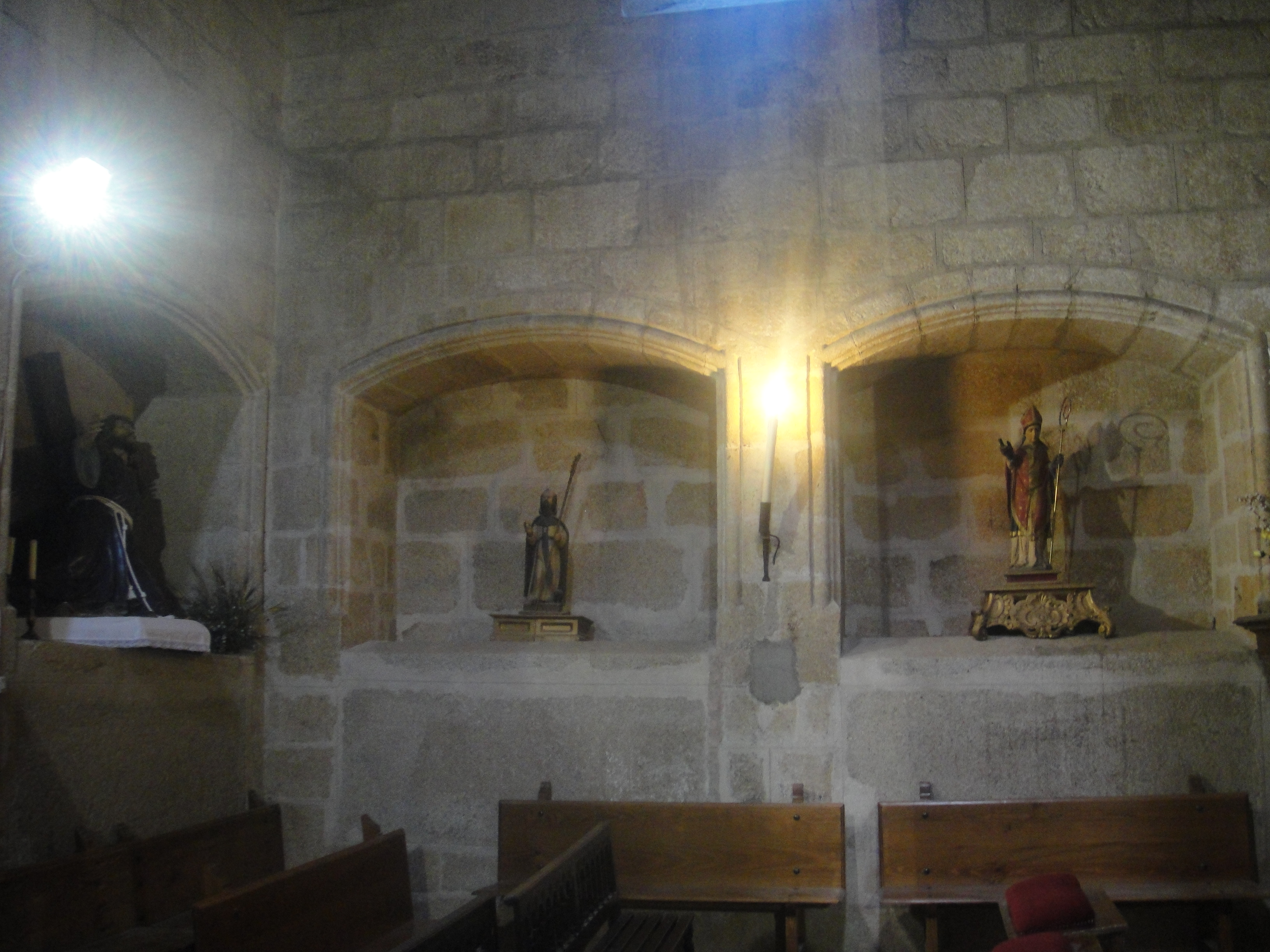 Capilla de la Iglesia de Santiago de Cáceres, provincia de Cáceres, (España).